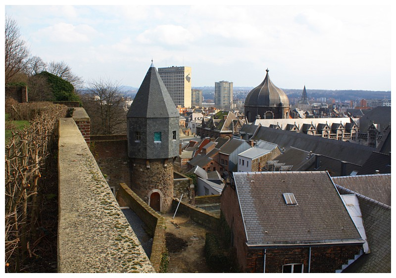 Oude commanderij van de Teutoonse orde, genaamd Vieux Joncs, Luik